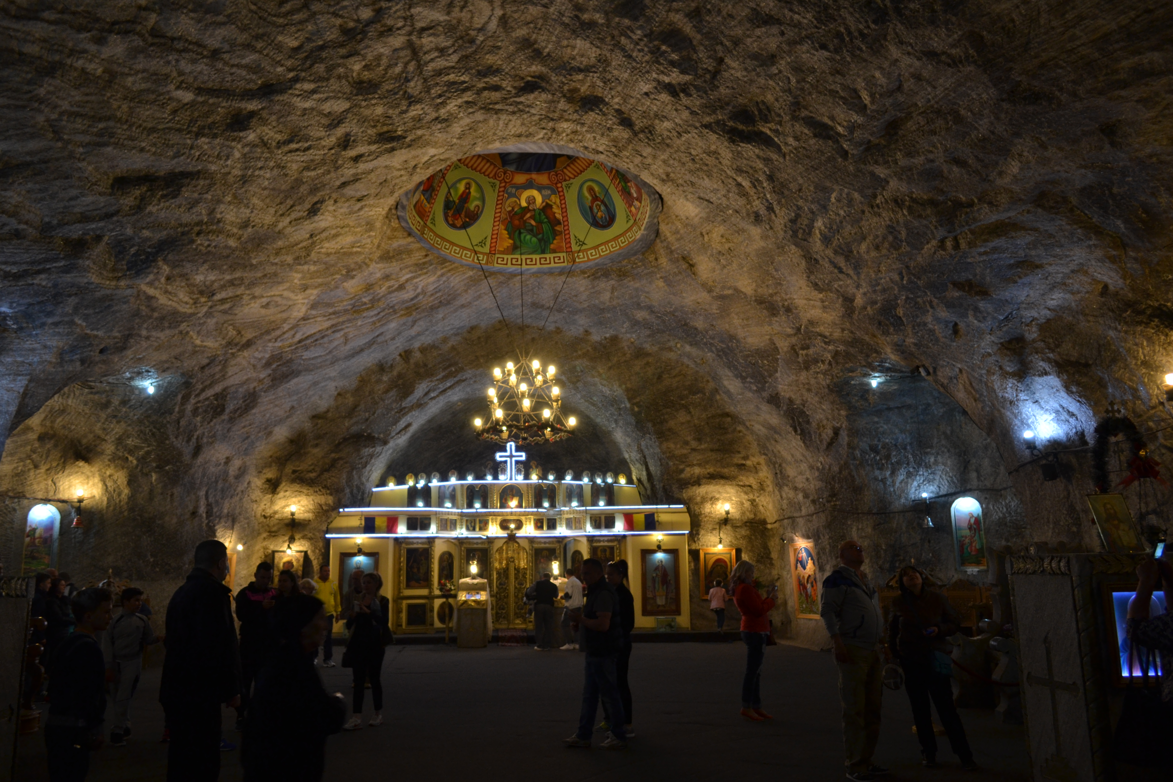 Biserica Sfânta Varvara, Târgu Ocna.